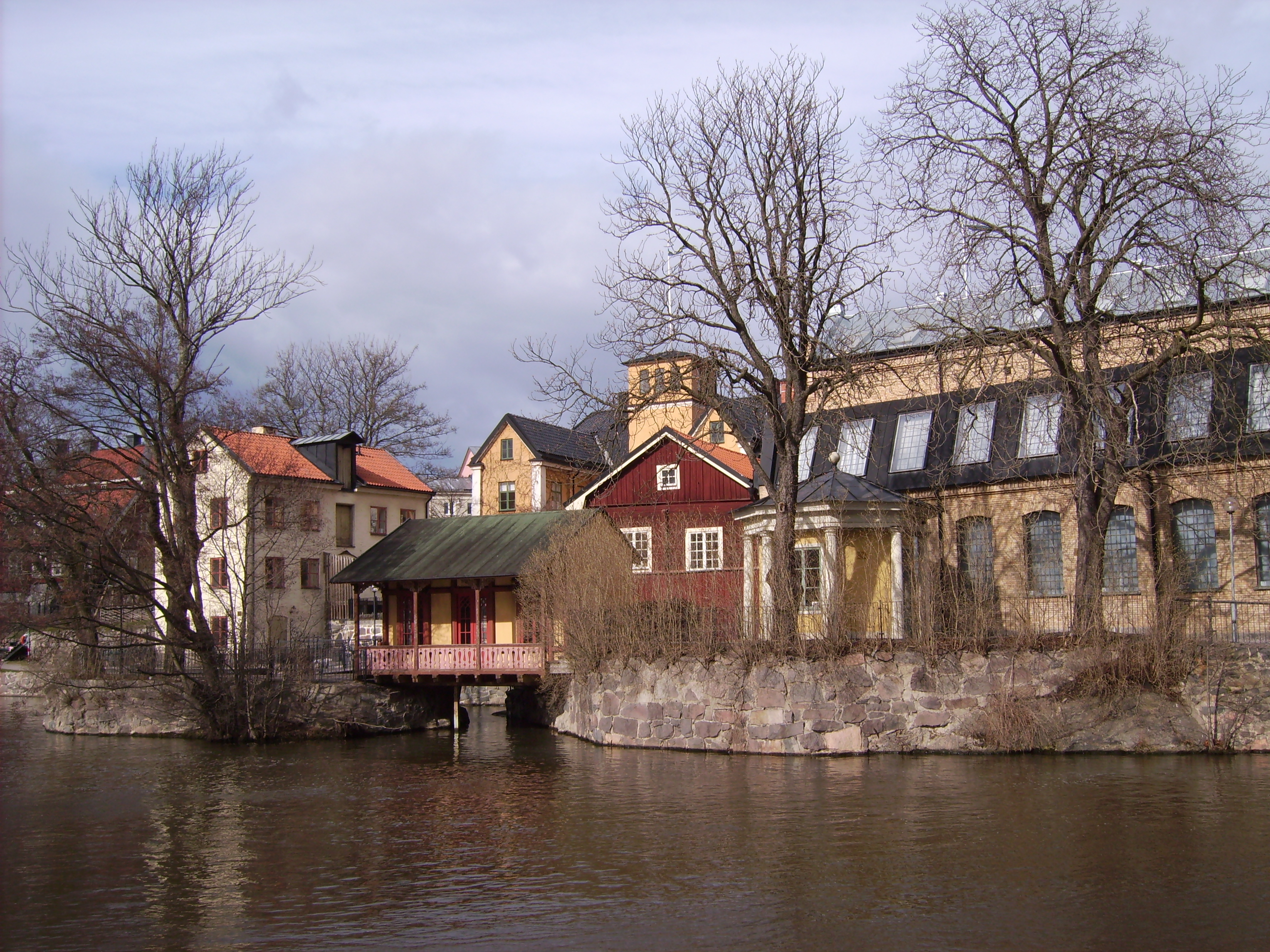 Bilden är fotograferad av Harri Blomberg. Photo by Harri Blomberg.